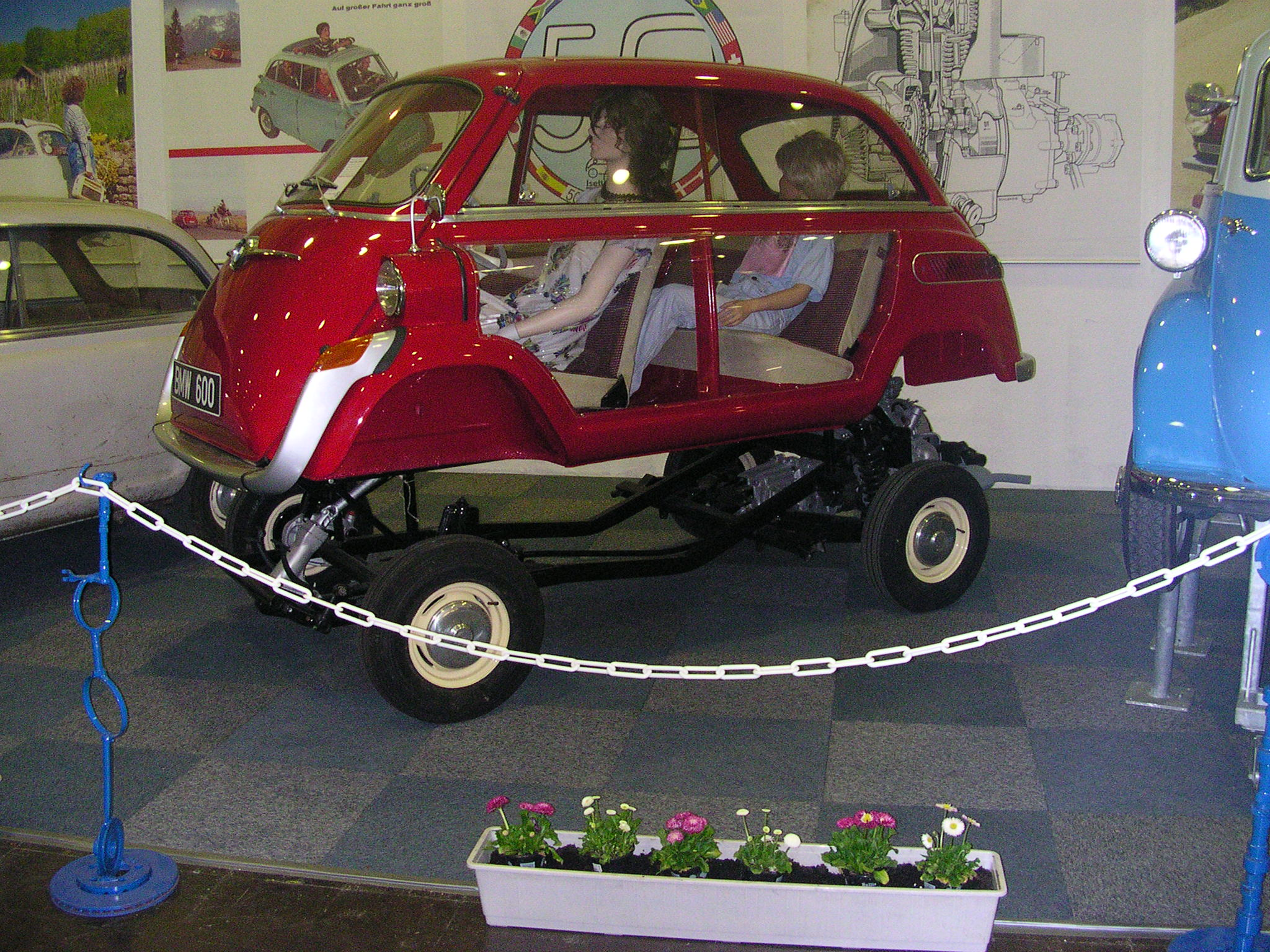 BMW 600 Schnittmodell bei der Techno-Classica Essen 2007